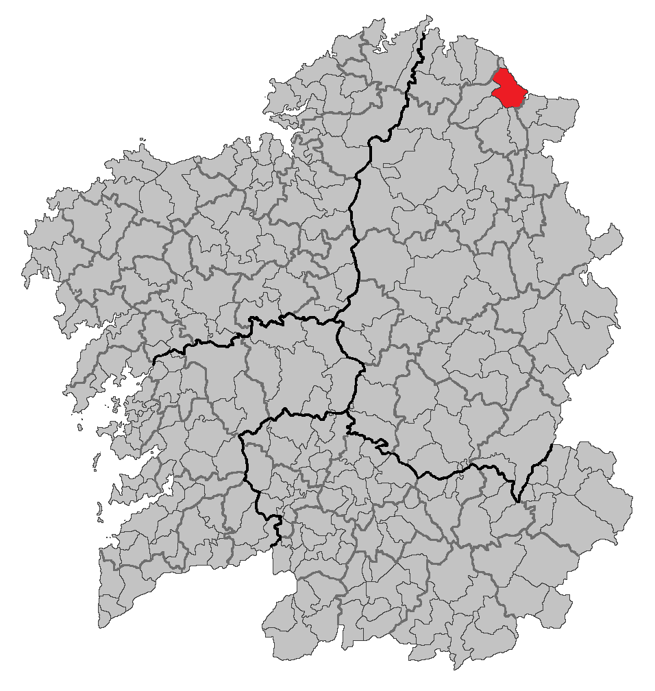 Mapa coa localización do concello de Foz.